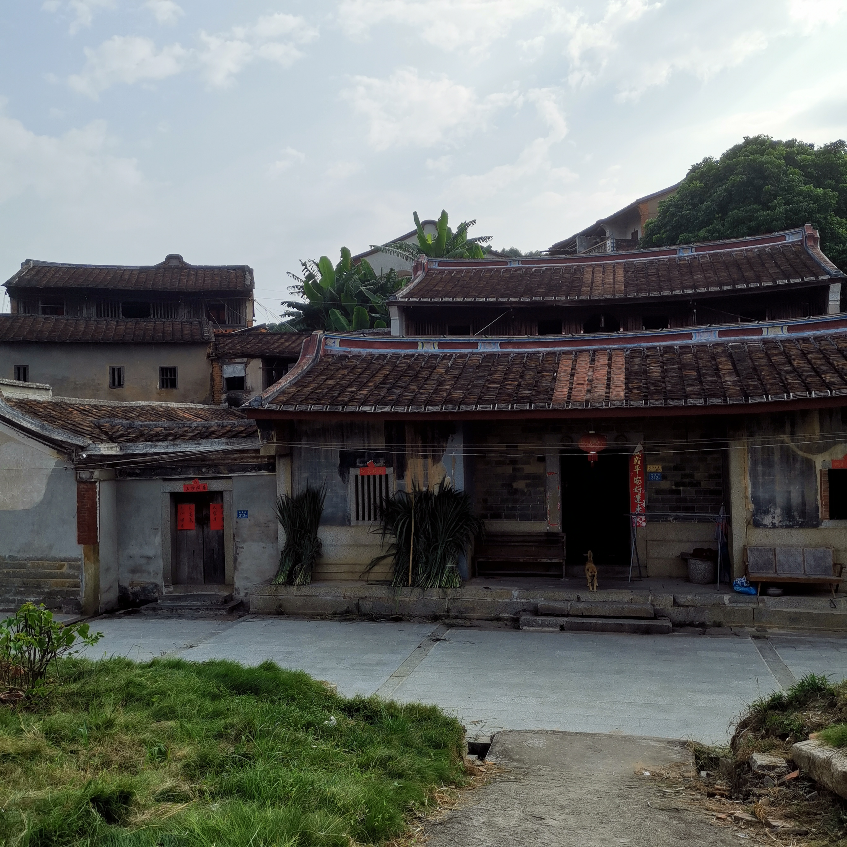 浦南镇双溪村